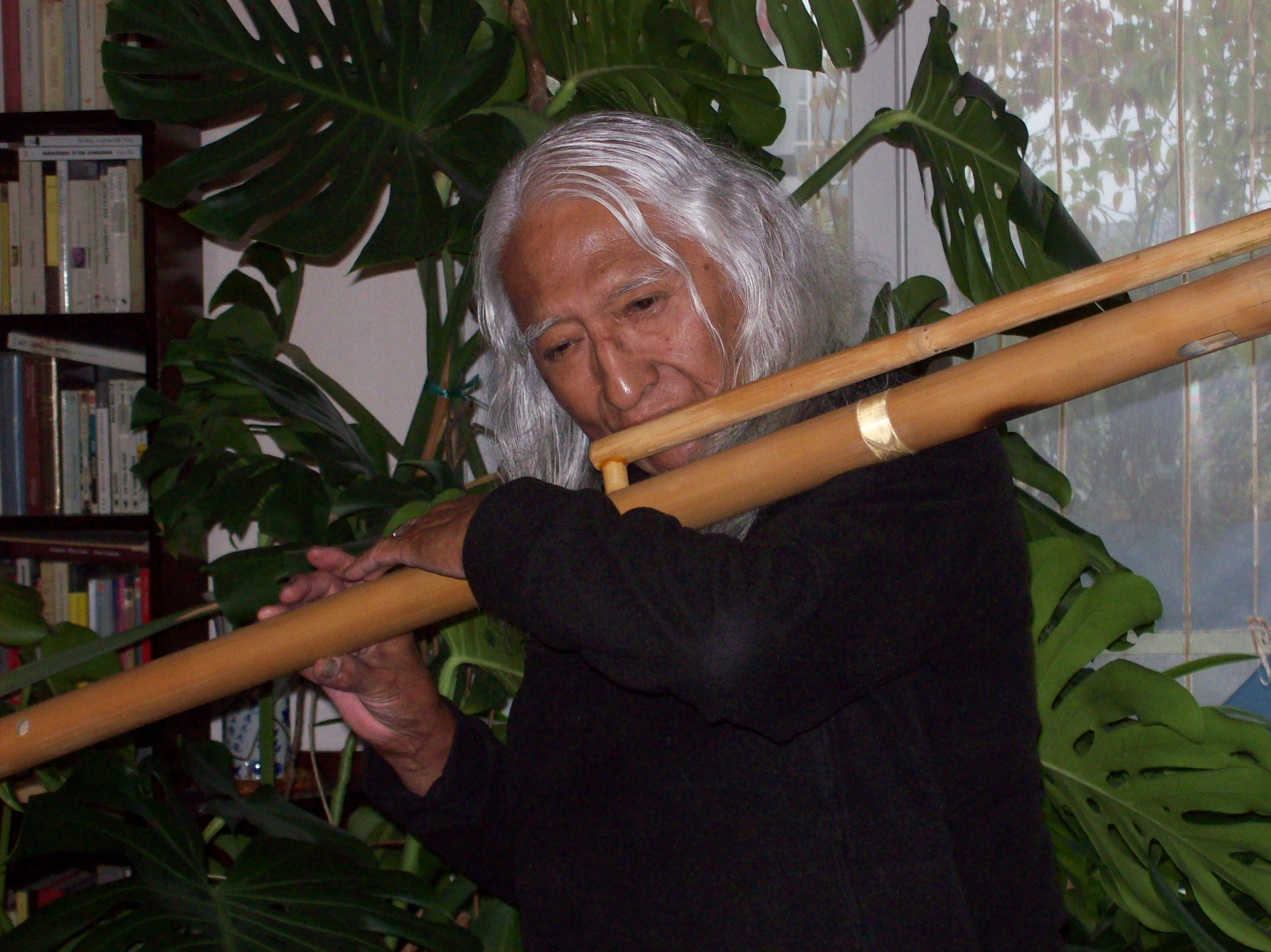 Uña Ramos et le mohoceno